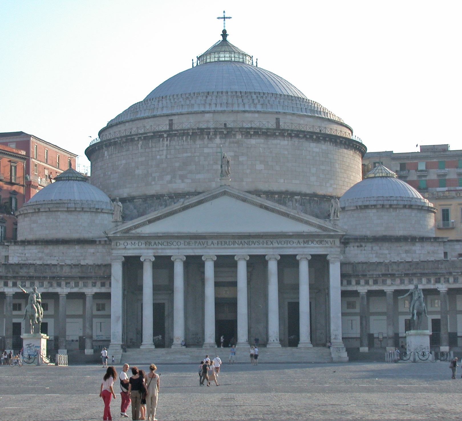 Italia, regione Campania, Napoli, chiesa di San Francesco da Paola (piazza del Plebiscito), facciata della chiesa.